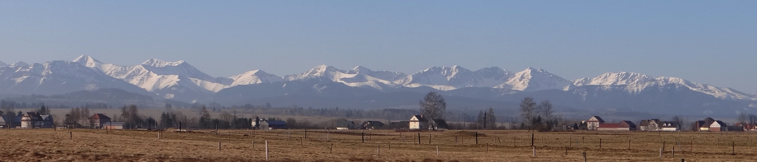 Panorama widokowa z Wróblówki